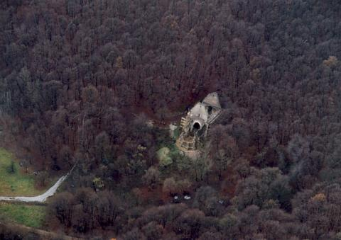 Rakaca, Hungary, aerialphotography